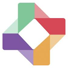 Ilustración Educatina